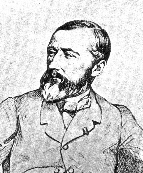 Portrait d'Émile Loubon, collection Teissier, Musée-Bibliothèque de Draguignan.